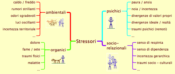 Grafica: Medicina: Fisiologia: Psicologia: Stressori: organici, ambientali, psichici, socio - relazionali, autoconservanti, specie - riproduttivi